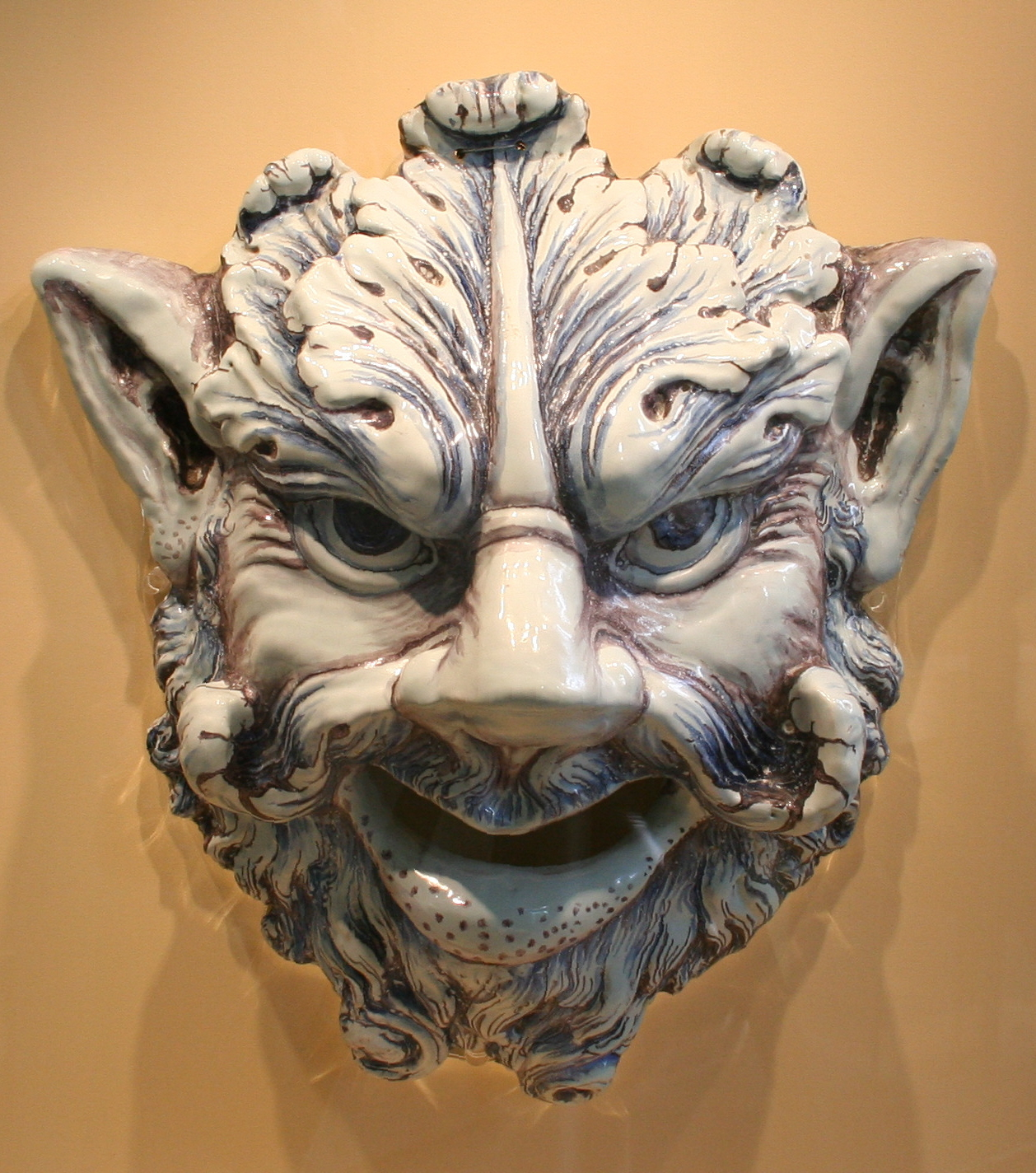 Musée de la faïence à Marseille. Mascaron en faïence stannifère, décor grand feu bleu et manganèse fin du XVIIème siècle. Dimension : 48cm.x40cm.